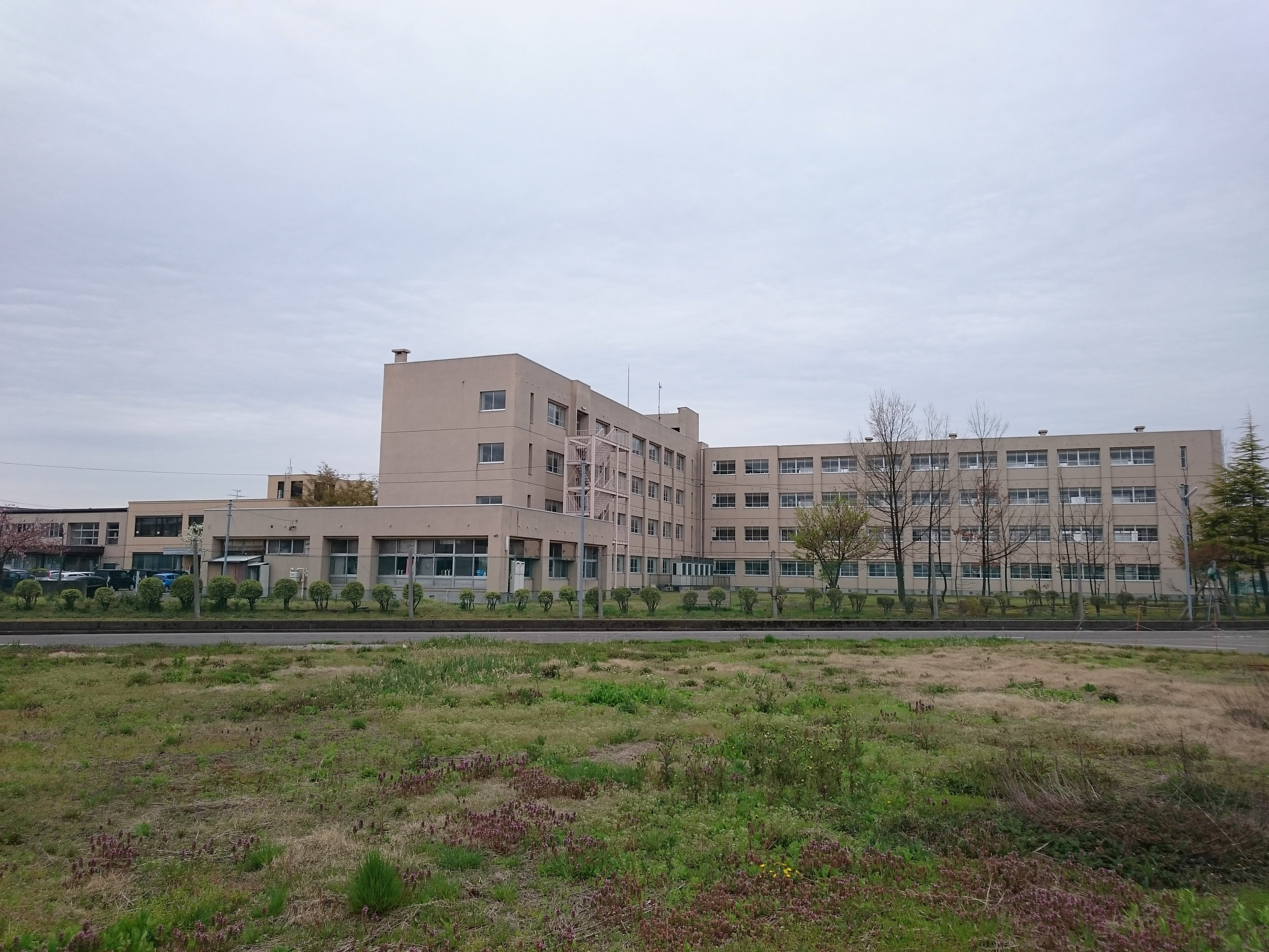 長岡市立大島中学校の校舎全景